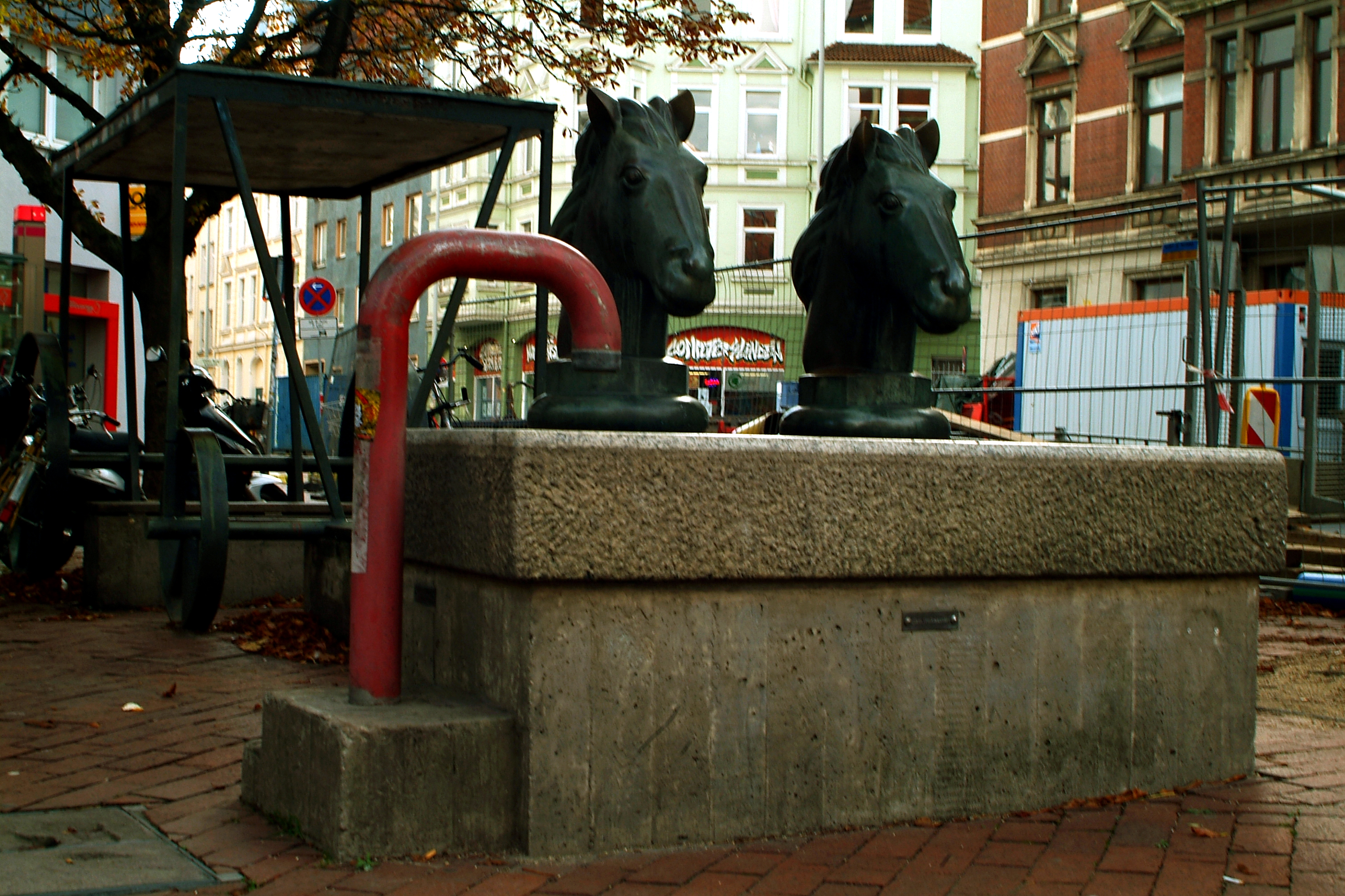 Der 1978 bis 1979 von Max Sauk geschaffene Pferdekutschenbrunnen; Blick auf die Kutsche von schräg vorne links aus Kinderperspektive